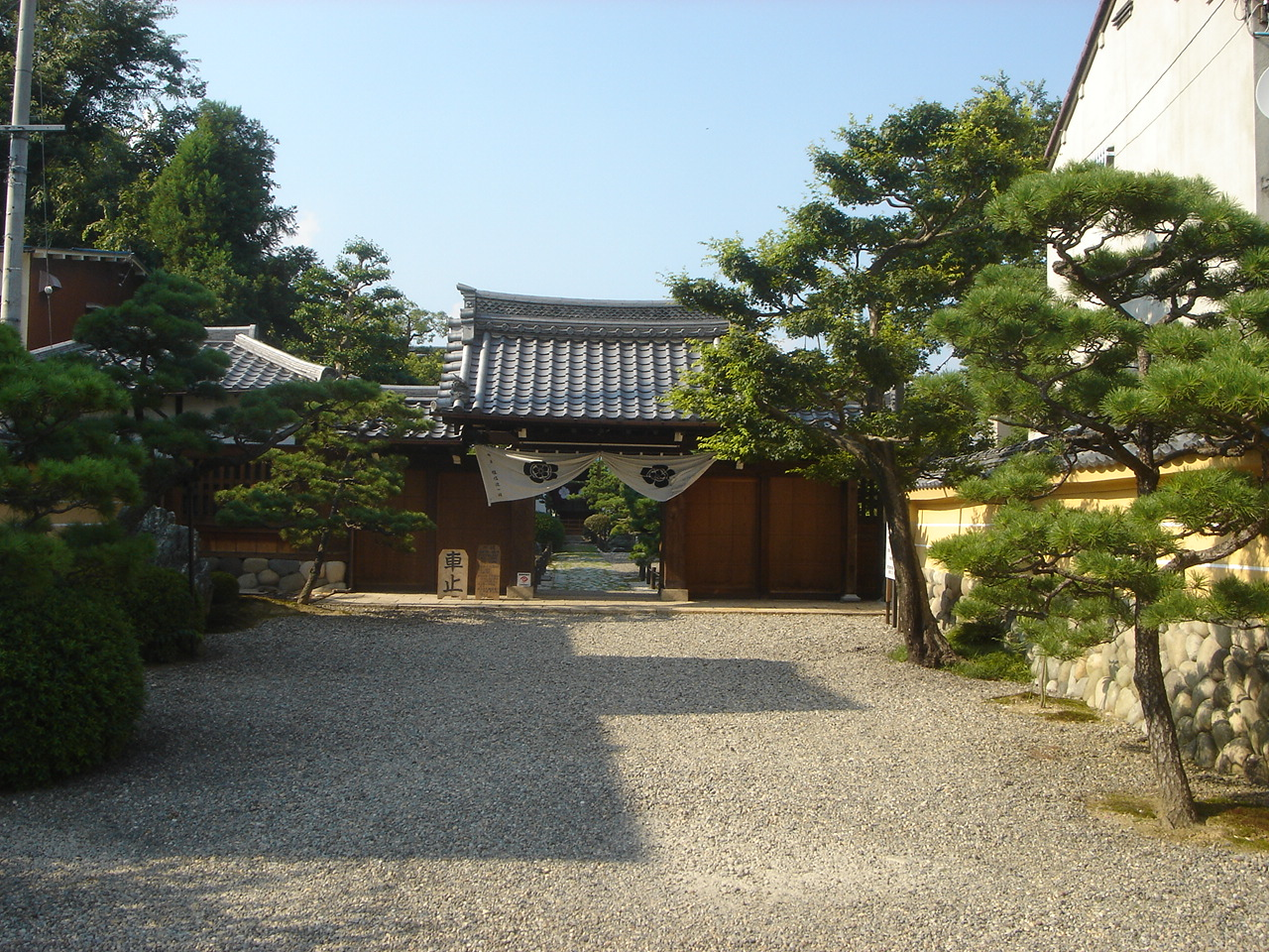 Sōfuku-ji(Temple) in Gifu Pref(崇福寺 (岐阜市)),Gifu,Gifu,Japan(岐阜県岐阜市)で撮影